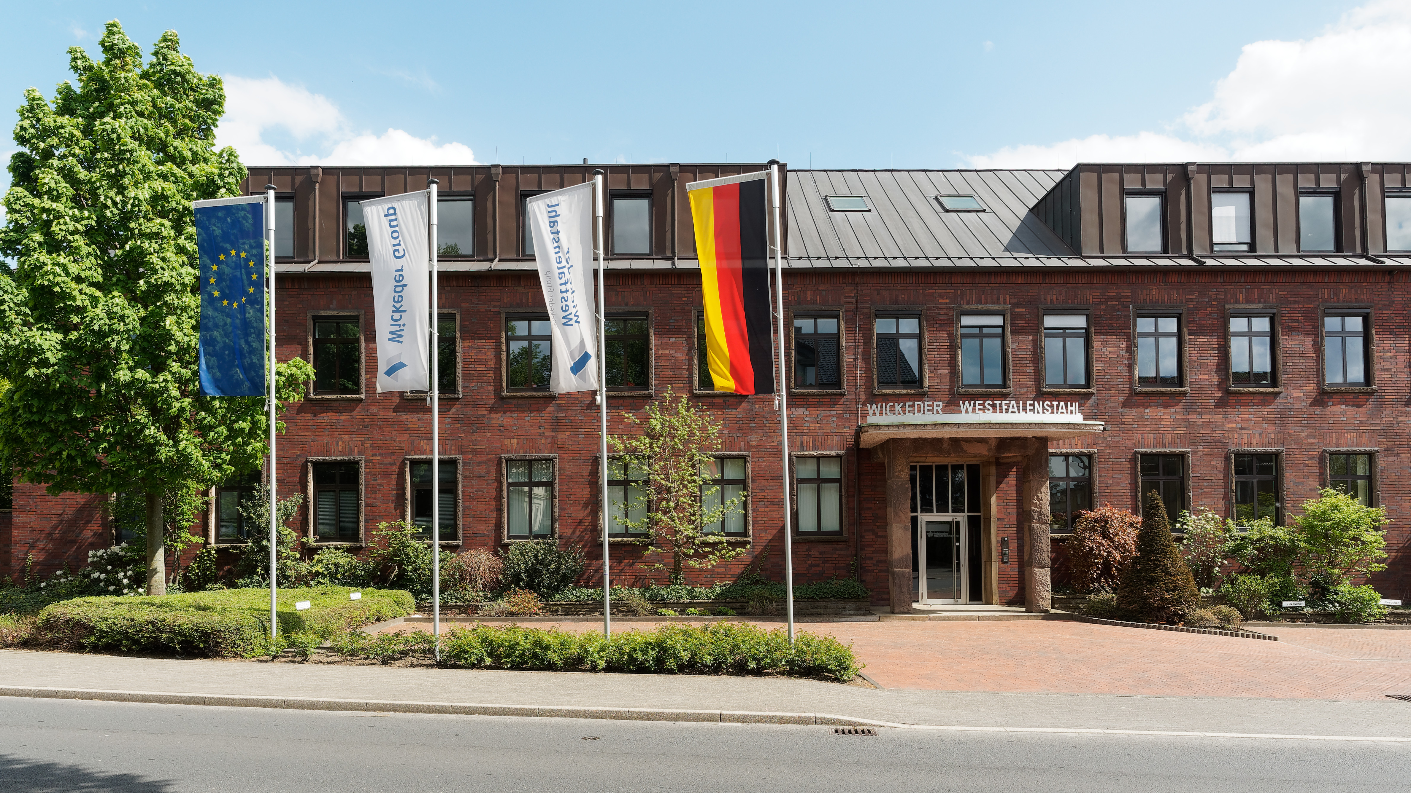 Eingang zur Verwaltung und zum Betrieb der Wickeder Westfalenstahl in Wickede (Ruhr), Webseite der Firma